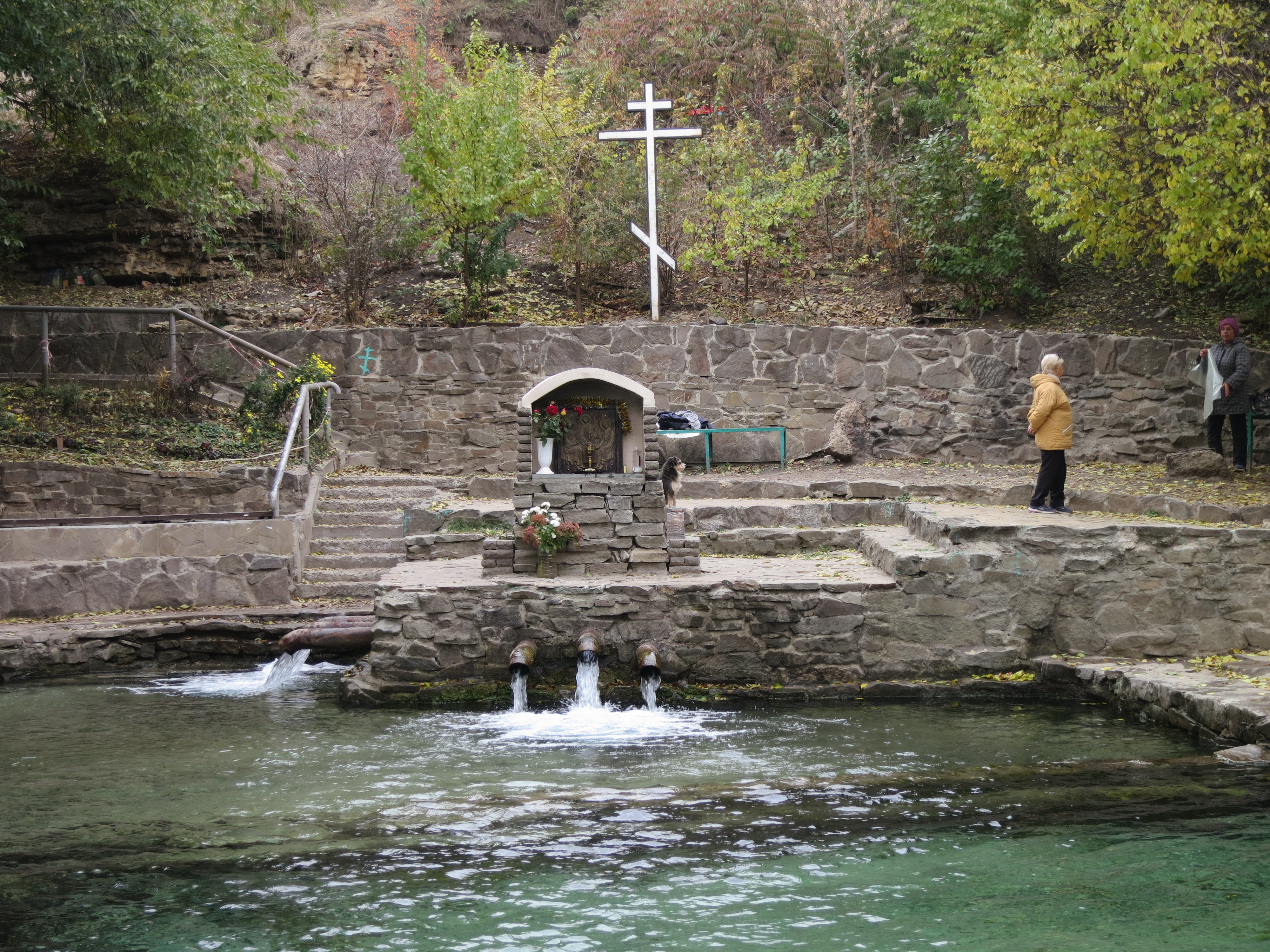 Родник 'Гремучий': Ростов-на-Дону, Ростовская область This image is related to the protected area of Russia number 6120123